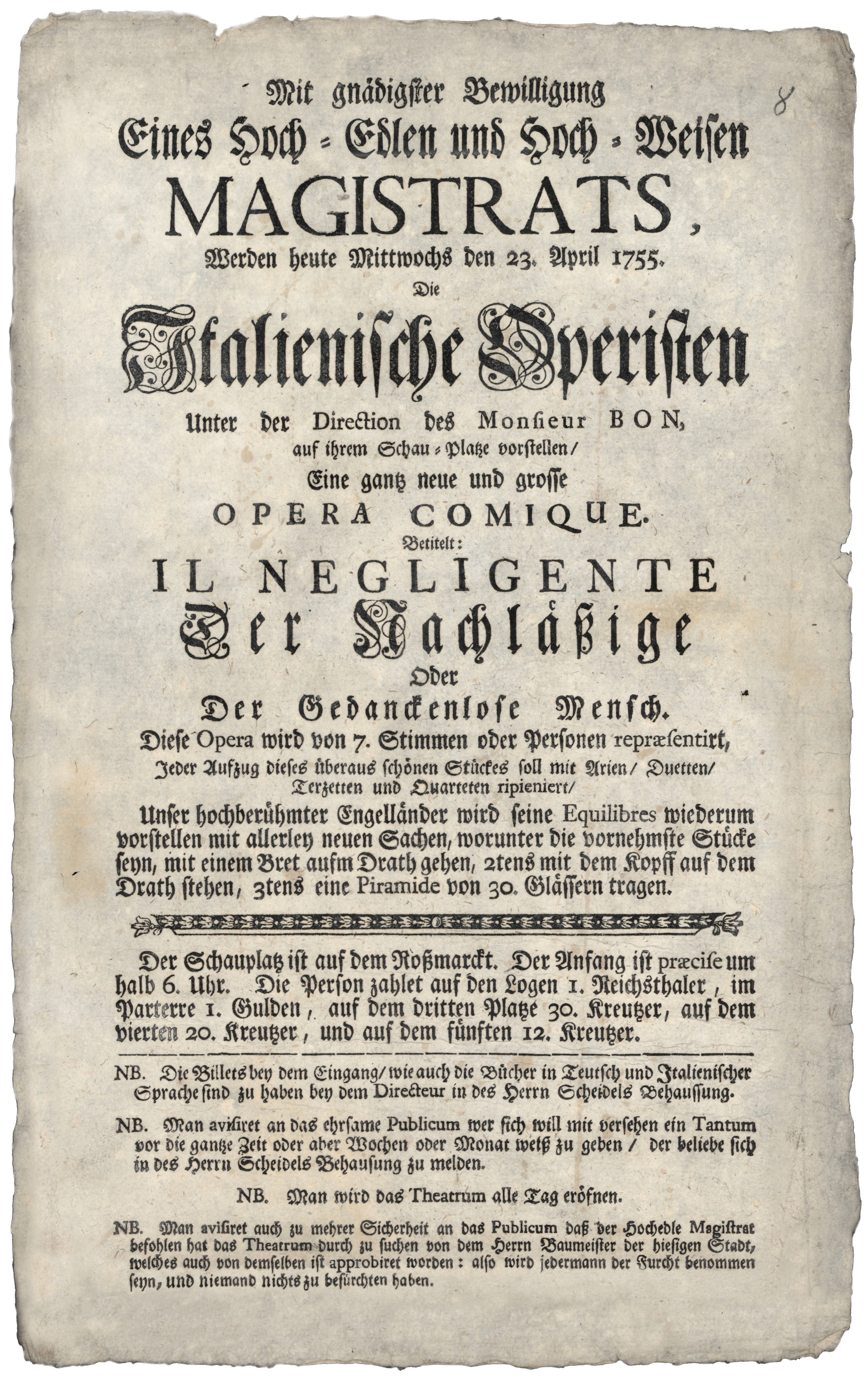 Il Negligente, Aufführung in Frankfurt a.M. am 23. April 1755, Wanderoper Girolamo Bon. (Universitäts Bibliothek der Goethe Universität Frankfurt a.M.)